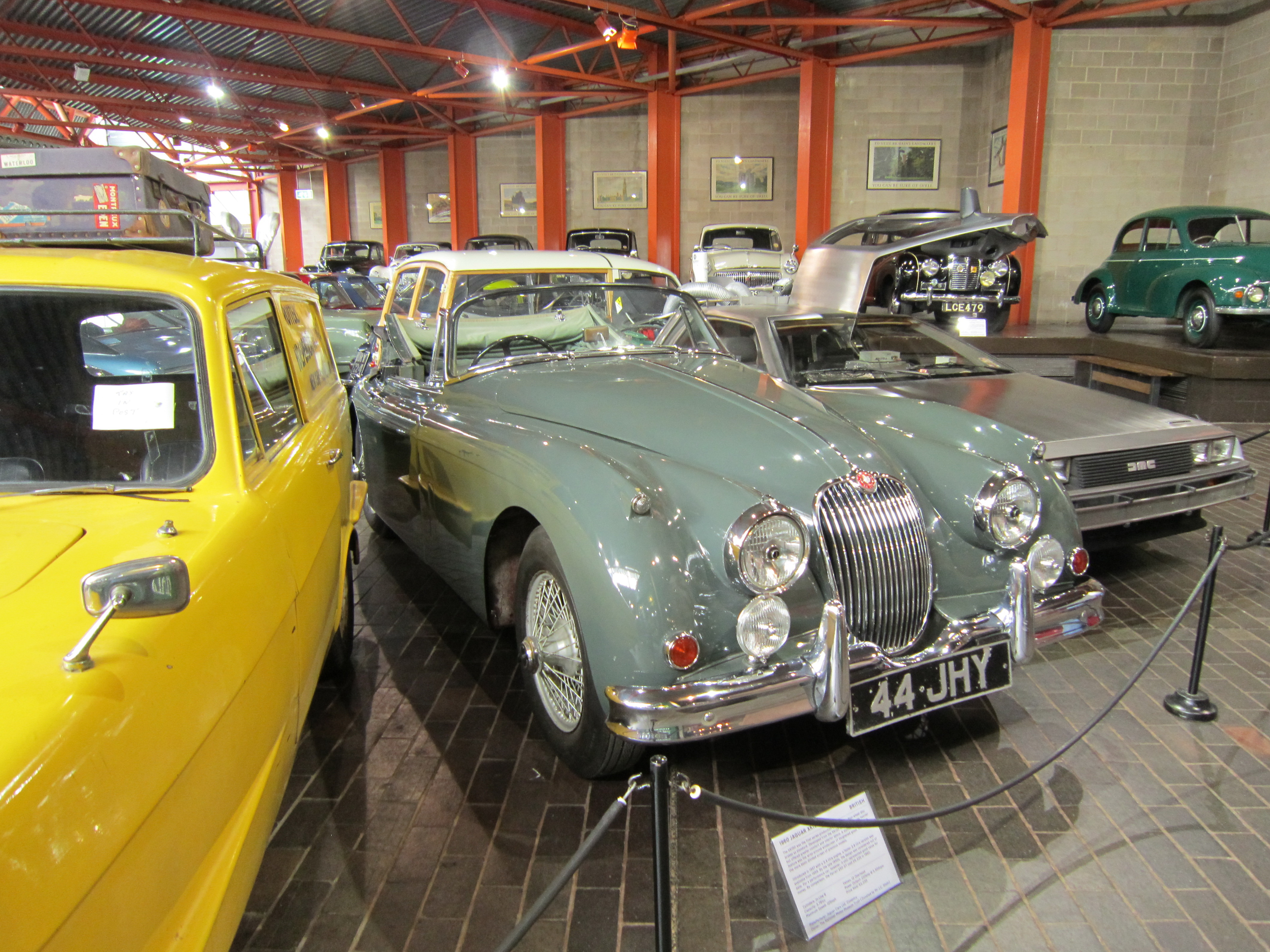 Beaulieu National Motor Museum, Beaulieu, Hampshire, England